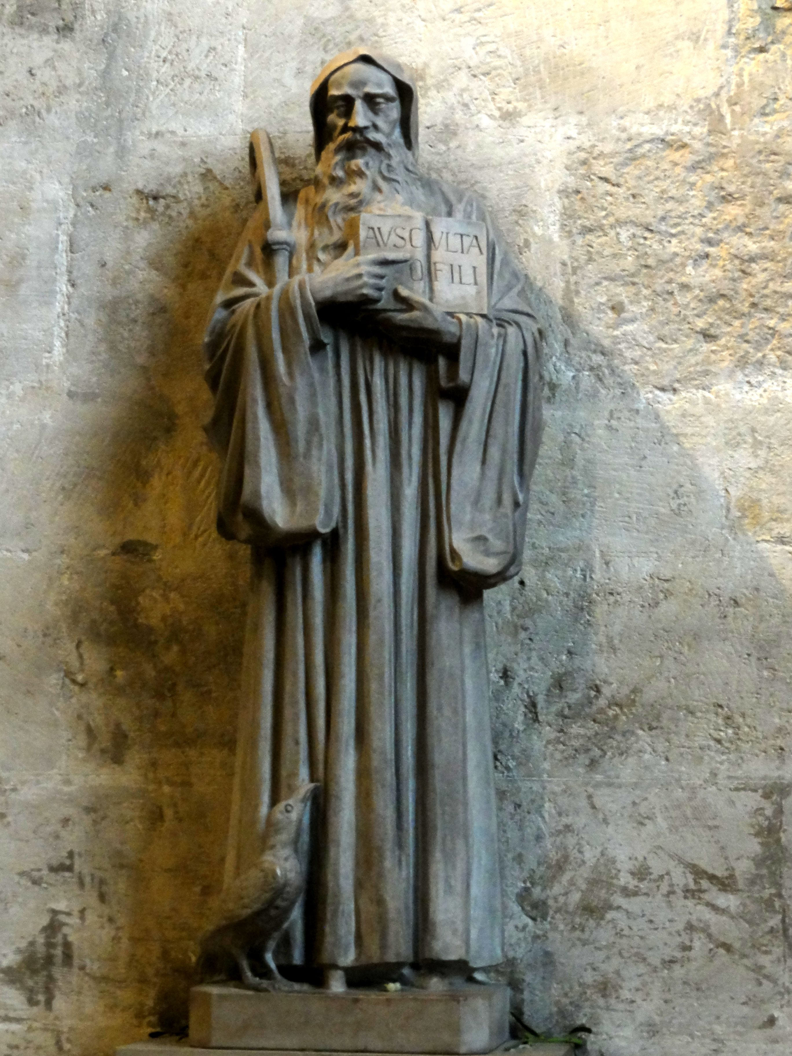 Chapelle Saint-Benoît, statue de saint Benoît de Nursie.